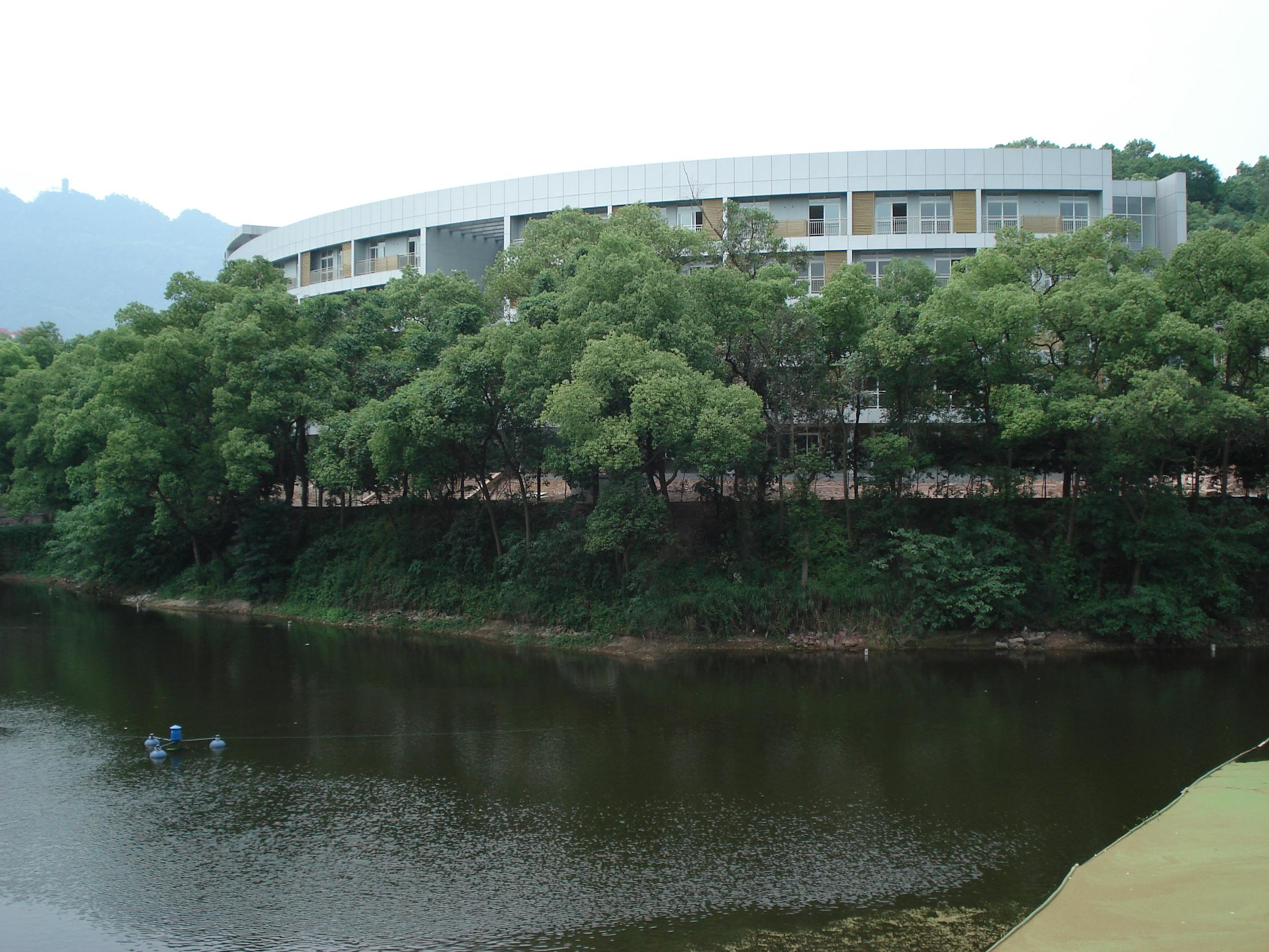 西南大學心裡學院